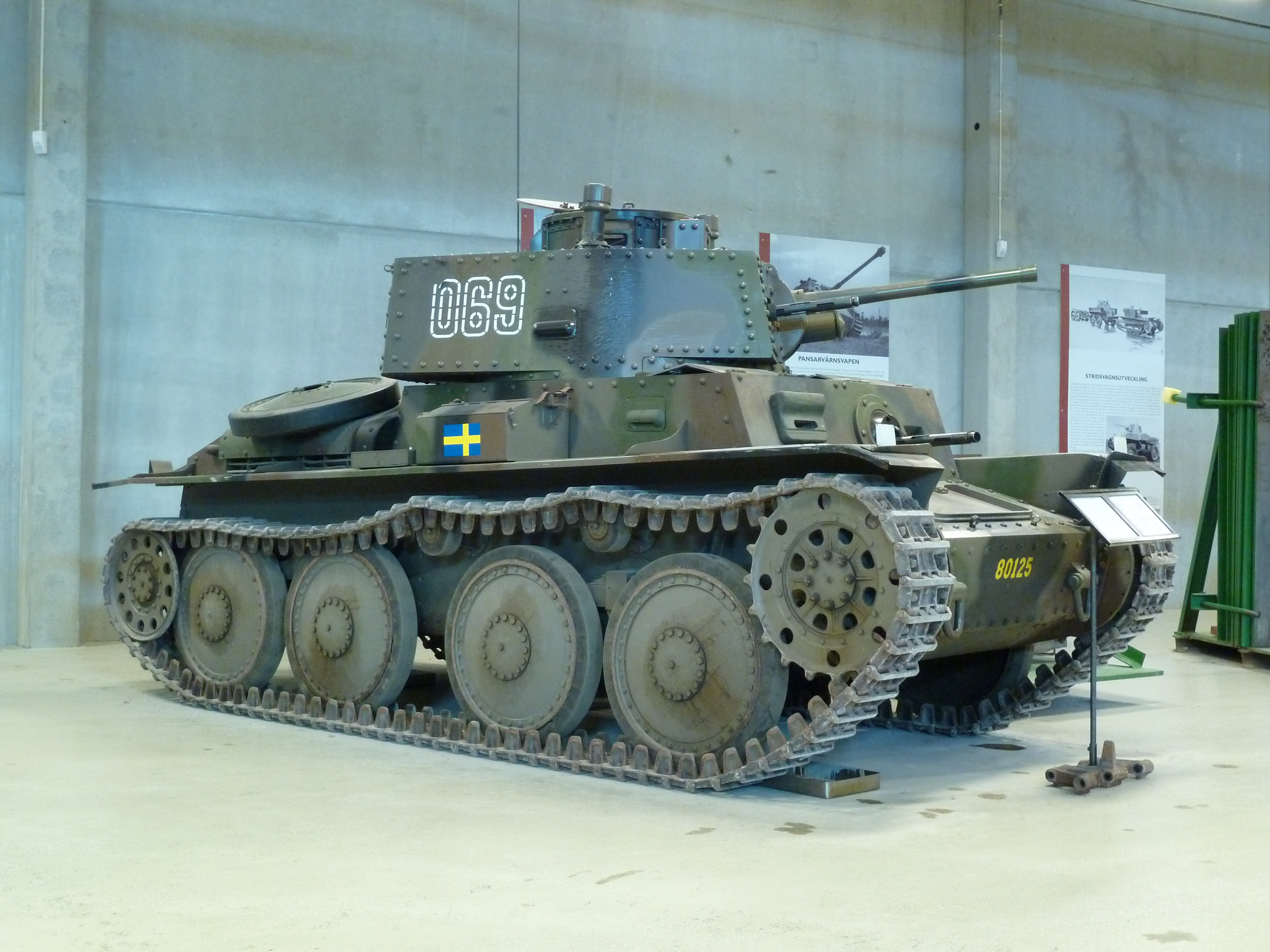 Stridsvagn m/41 på Arsenalen (Sveriges Försvarsfordonsmuseum - Strängnäs) 12.08.2011